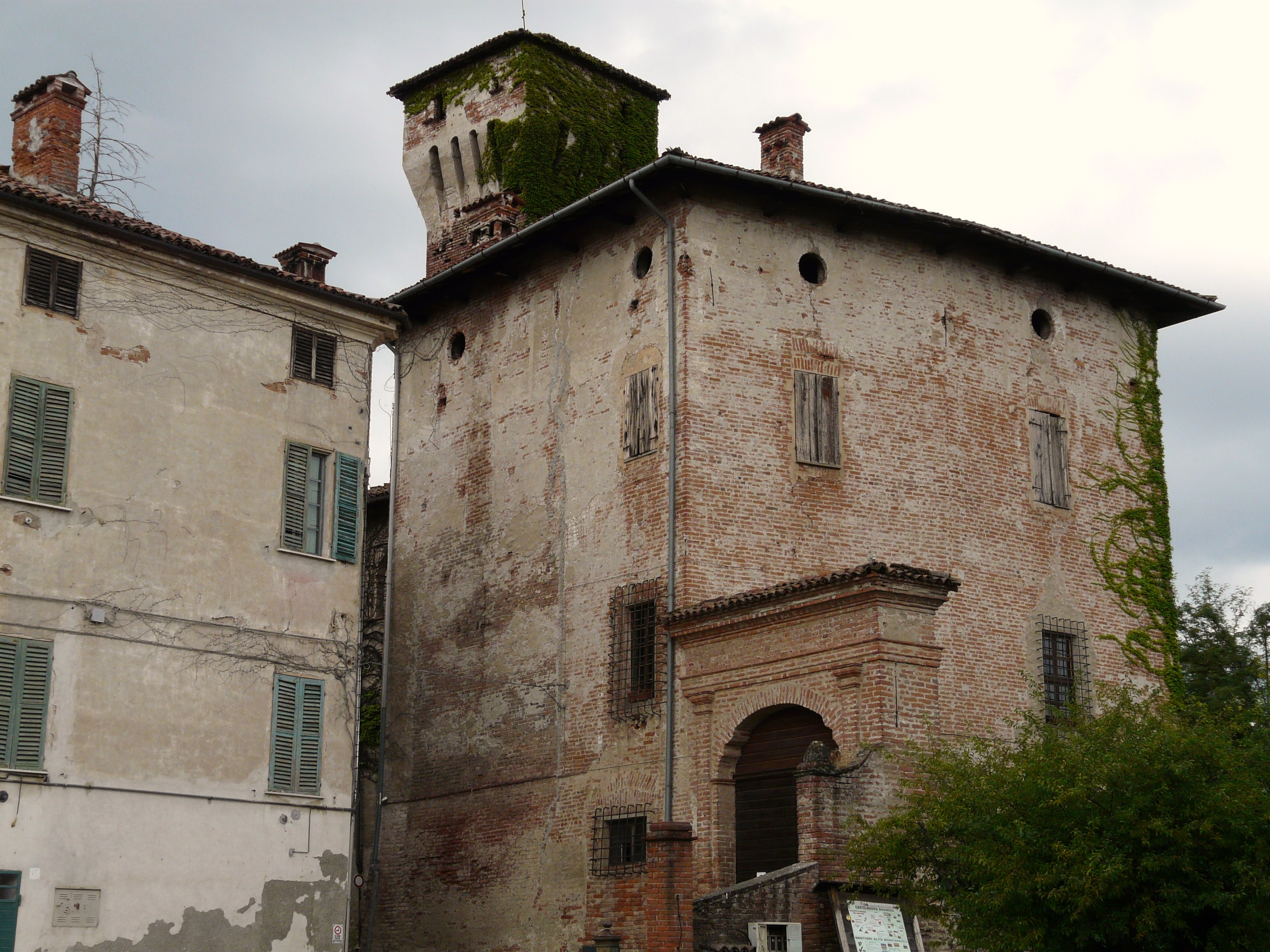 Castello di Castelnuovo Bormida, Piemonte, Italia